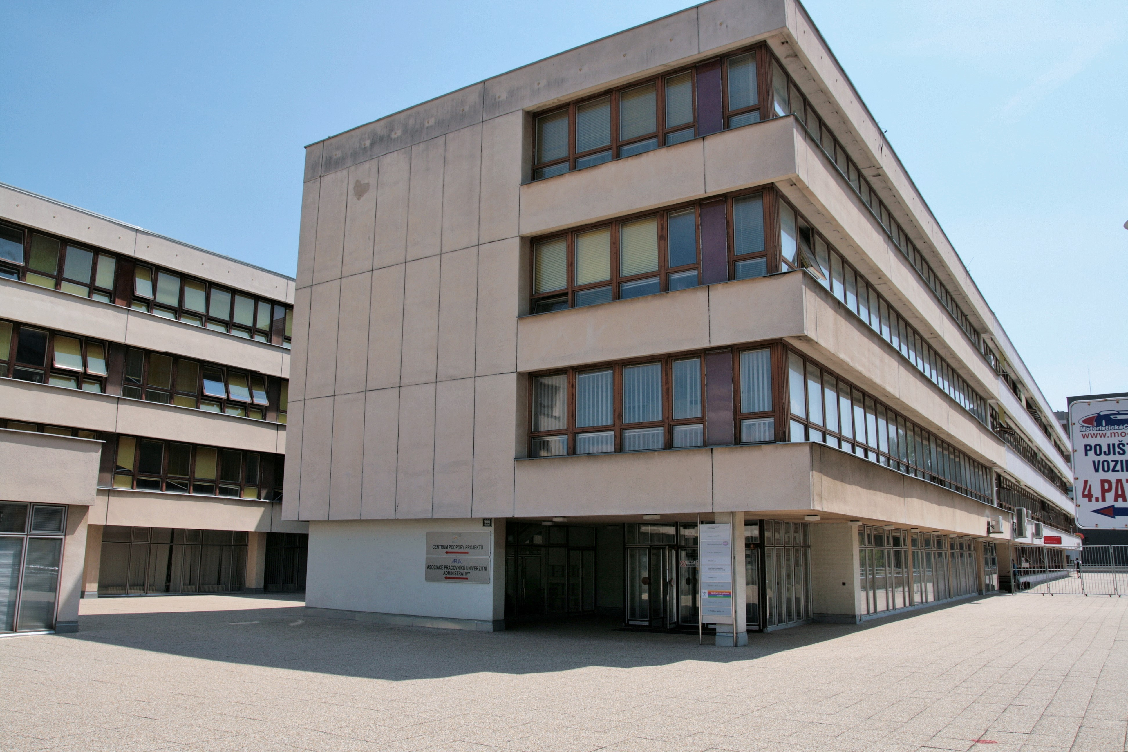 Budova Vysokého učení technického v Brně a dalších institucí na adrese Kounicova 966/67a, Brno. Pohled z terasy od severozápadu.